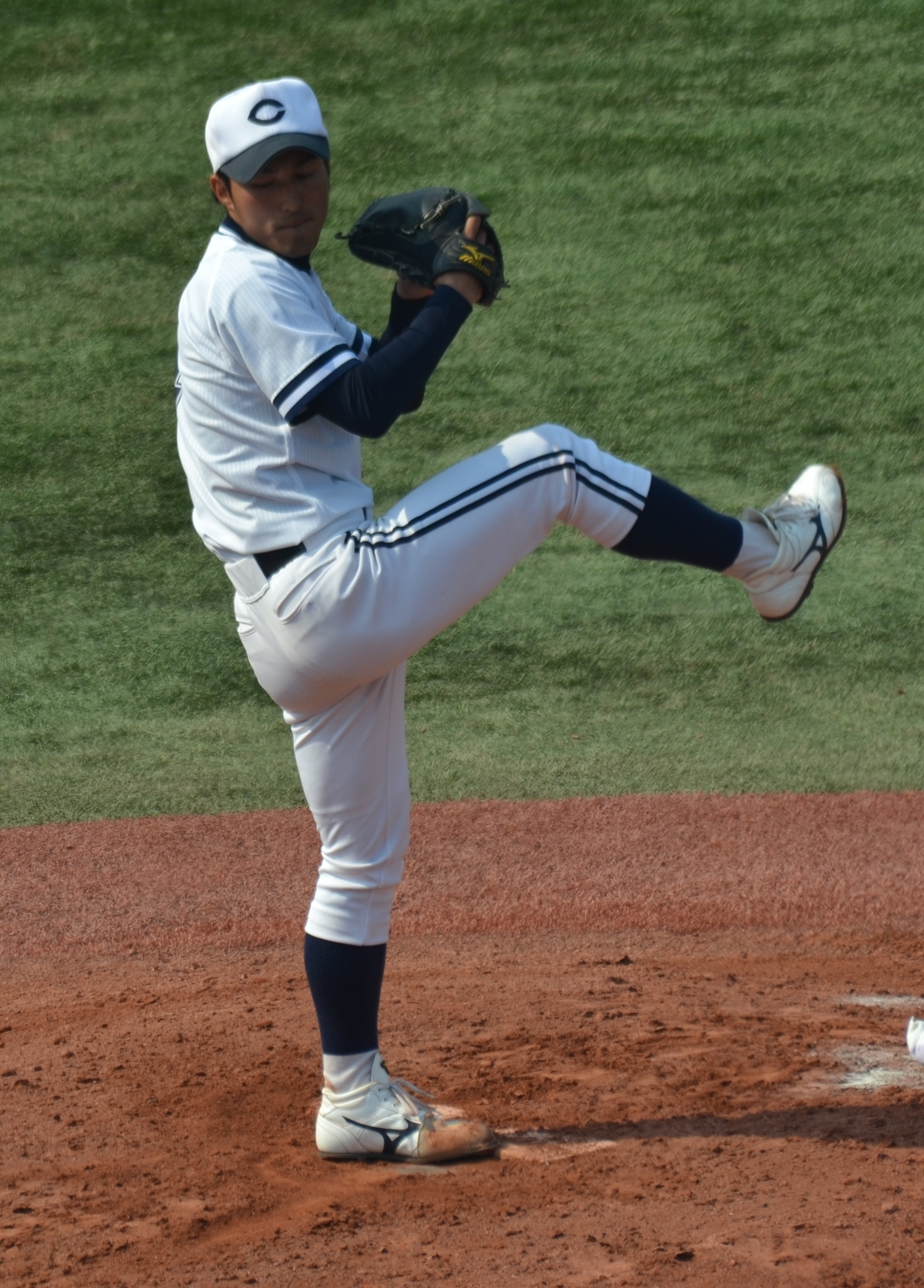 中央大学硬式野球部の島袋洋奨投手。2014年東都大学野球春季リーグ対亜細亜大学第2回戦、明治神宮野球場にて。